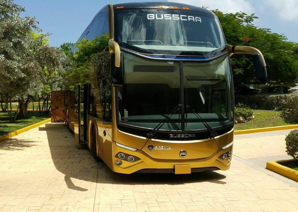 El nuevo BusStar DD S1